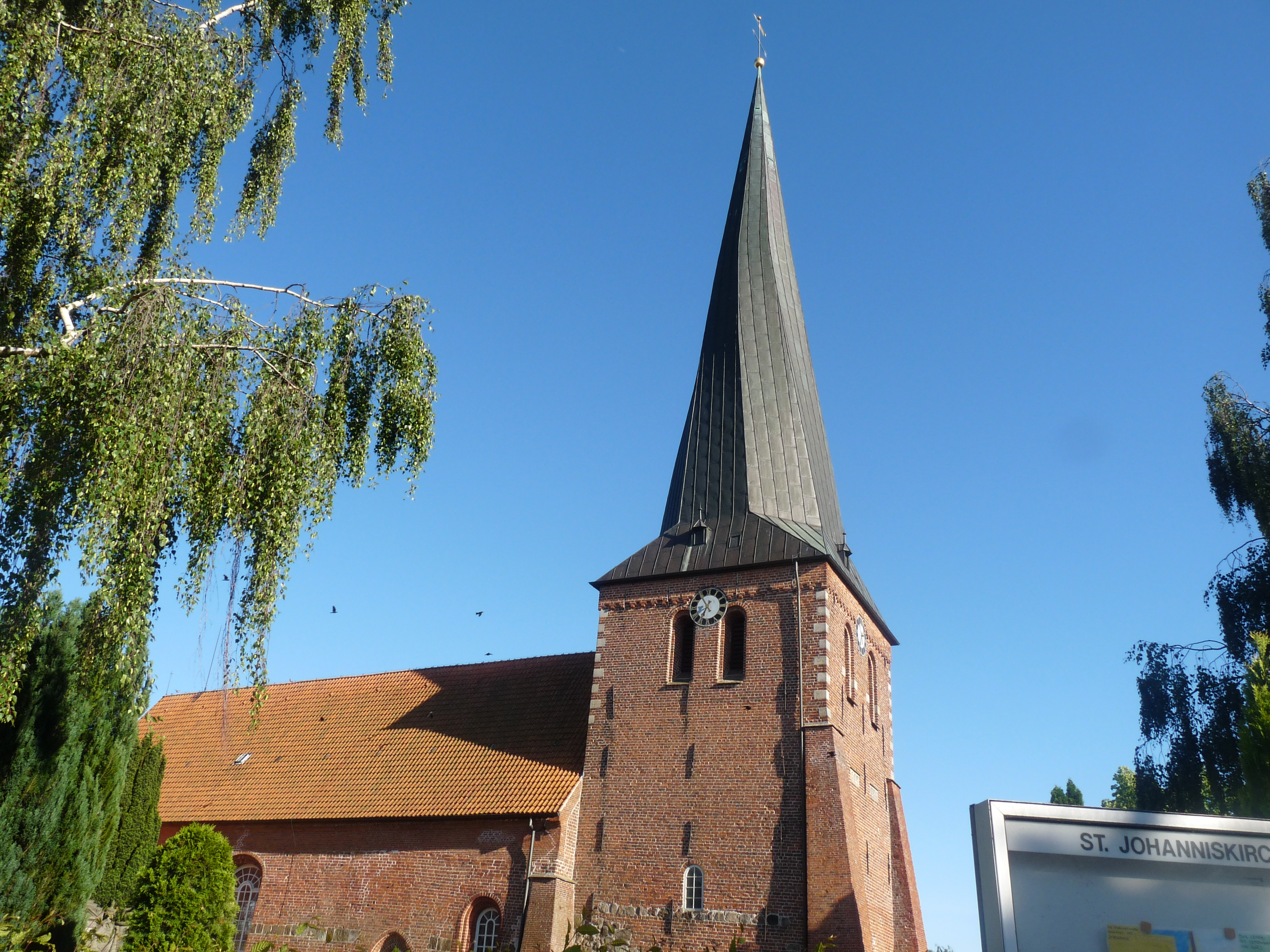 Clocher tors de l'église de Sandstedt (commune de Hagen im Bremischen, Basse-Saxe), photo prise lors d'un voyage en Allemagne en juin 2011.